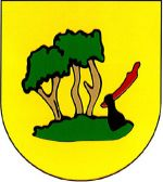 Herb Skbeńska